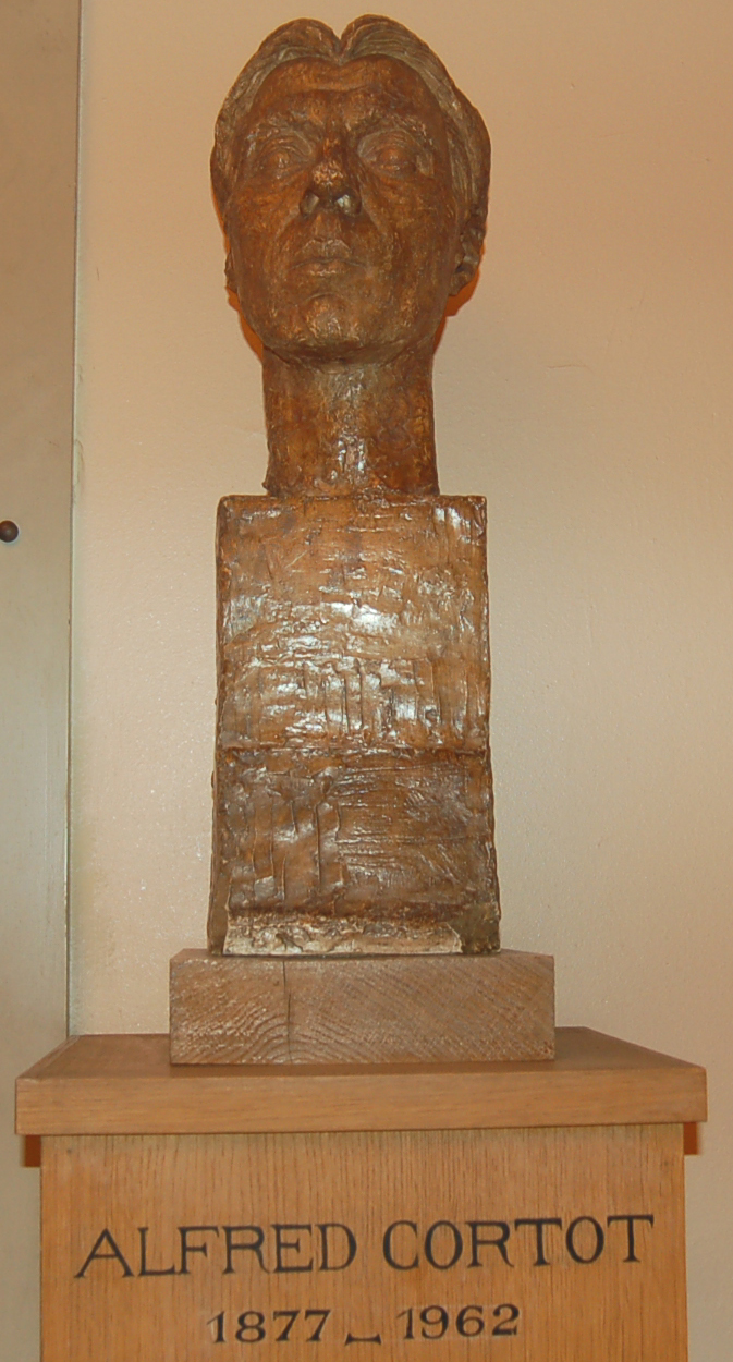 Buste d'Alfred Cortot à la salle Cortot à Paris